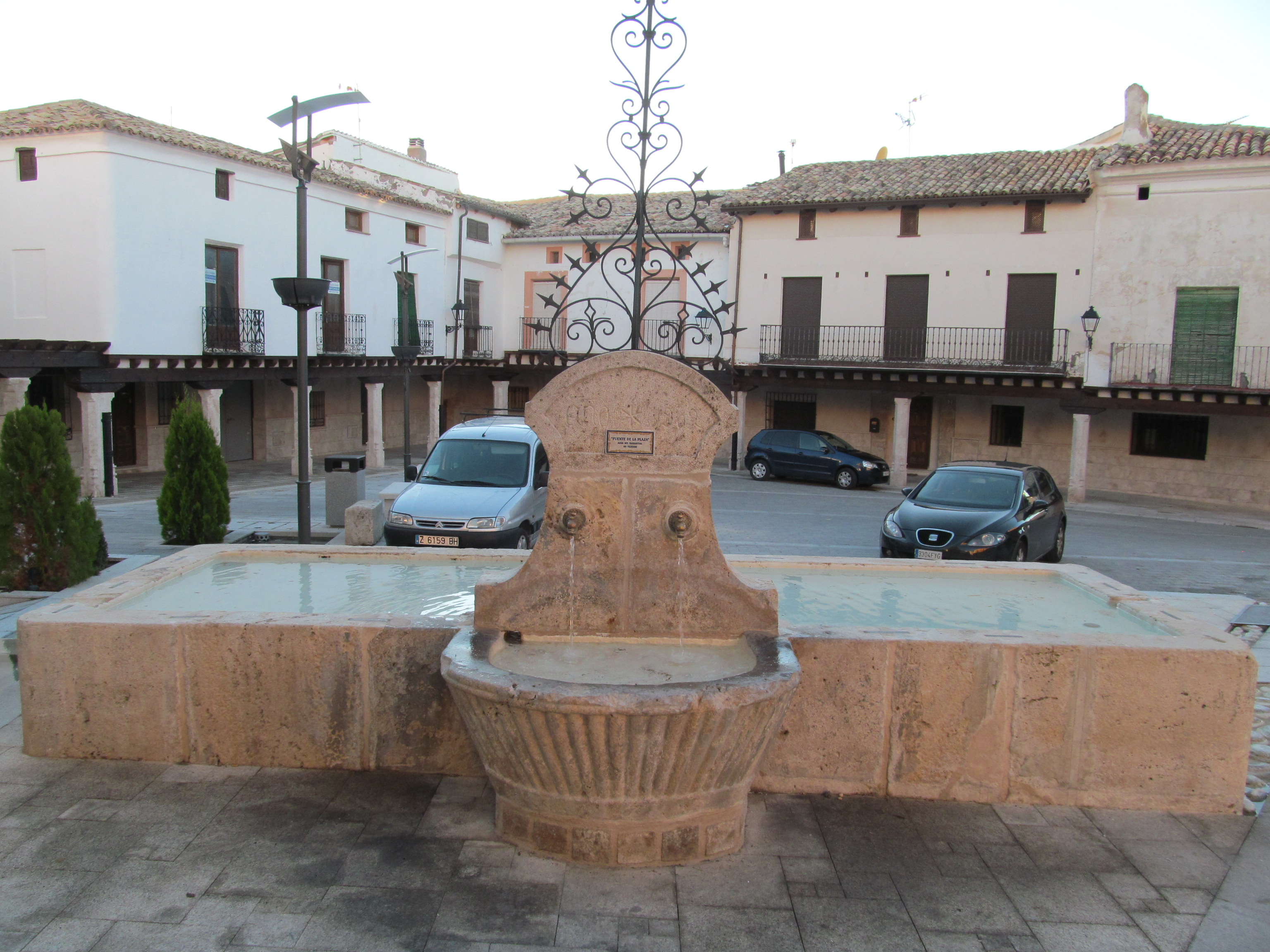 Almonacid de Zorita - Plaza de José Antonio y fuente, 1902.